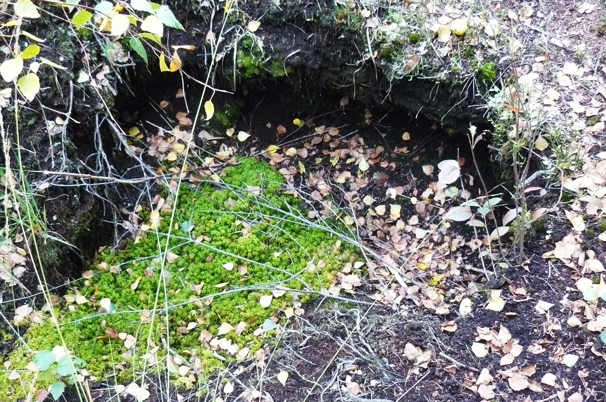 Torf na terenie Bagna Chlebowo.